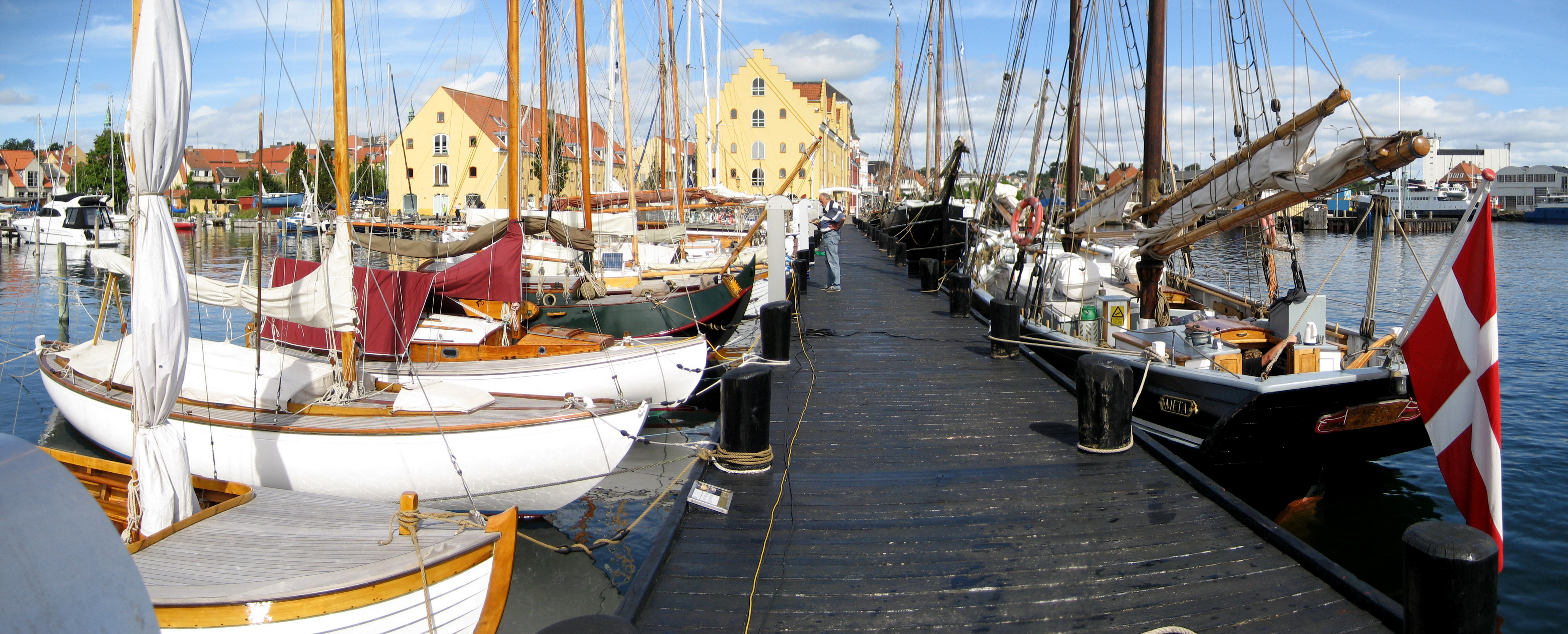 Museumshafen Svendborg